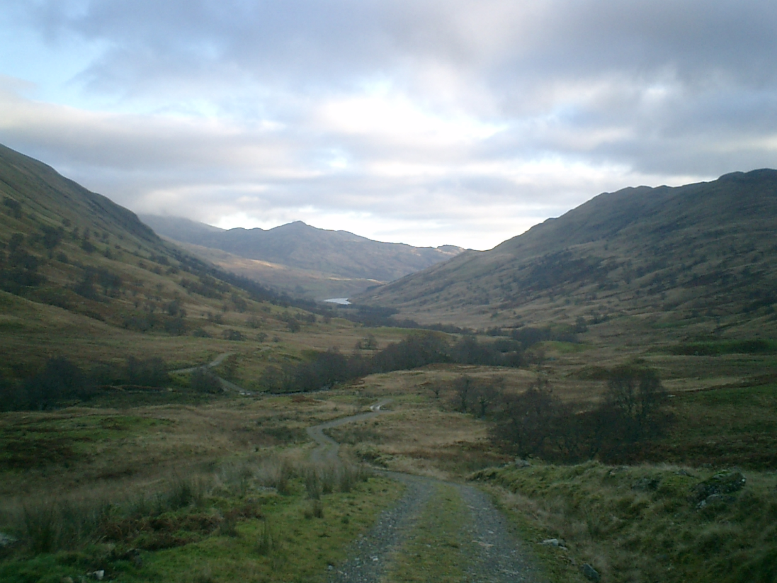 Glen Finglas